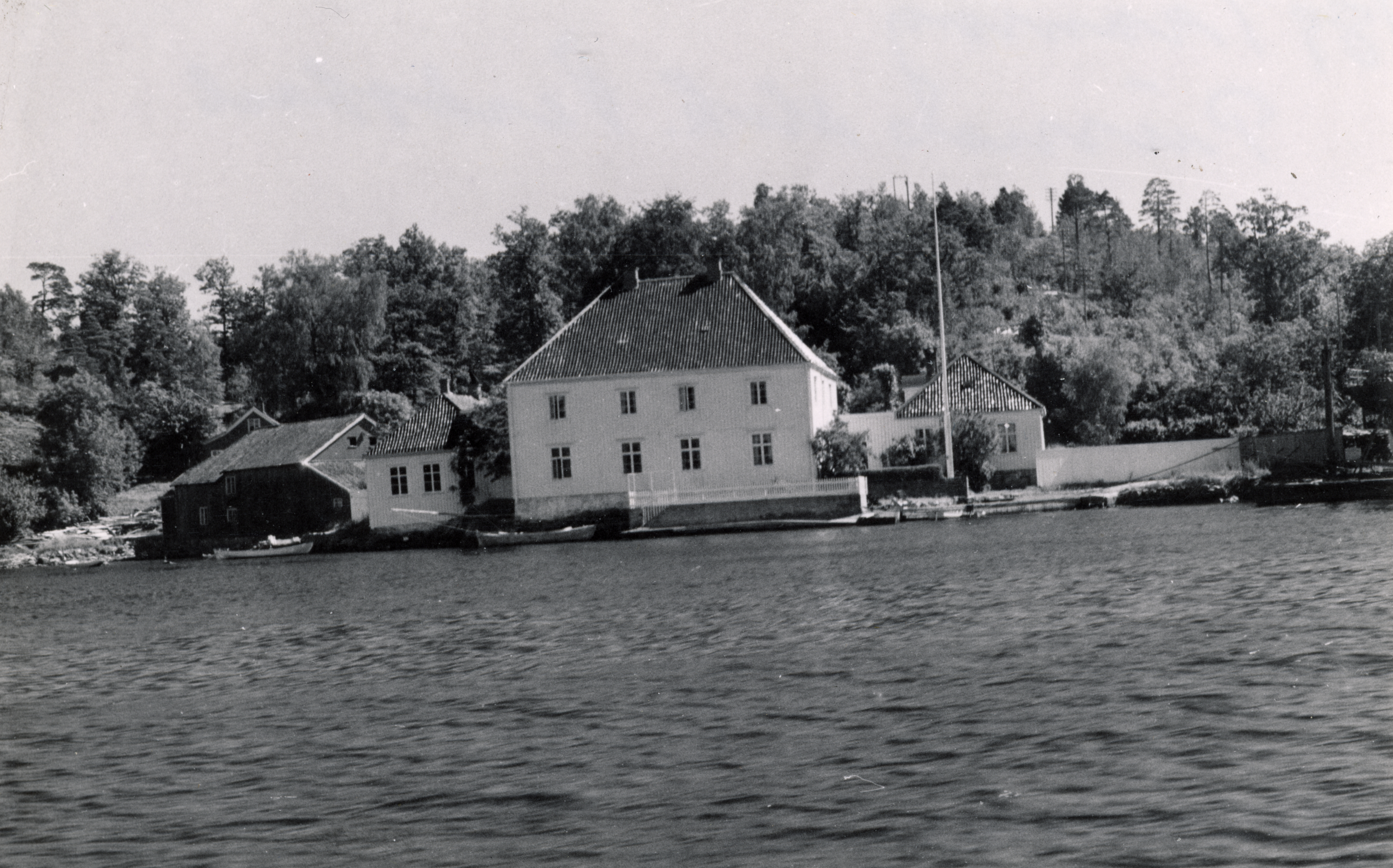 Pusnes, Aust-Agder This image on crowdsourcing geotagging platform Fotodugnad